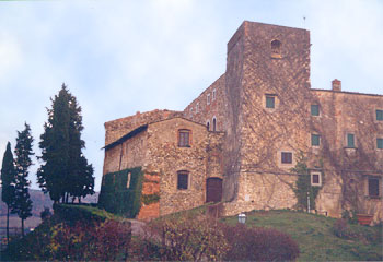 Castello di Pergolato Comune di San Casciano in Val di Pesa Foto personale quindi priva di copyright